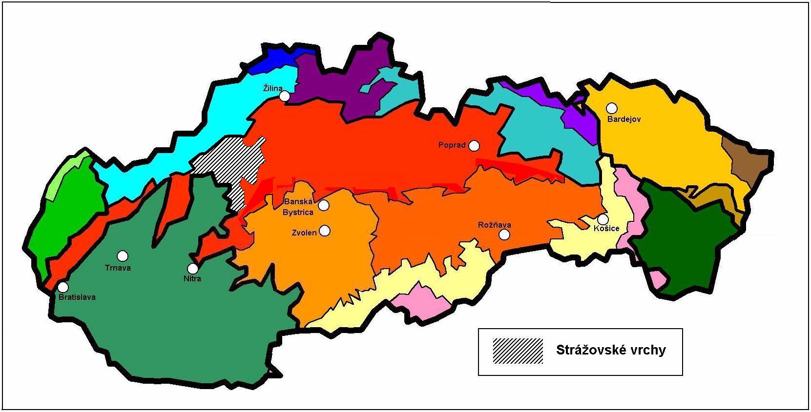 Strázovské vrchy